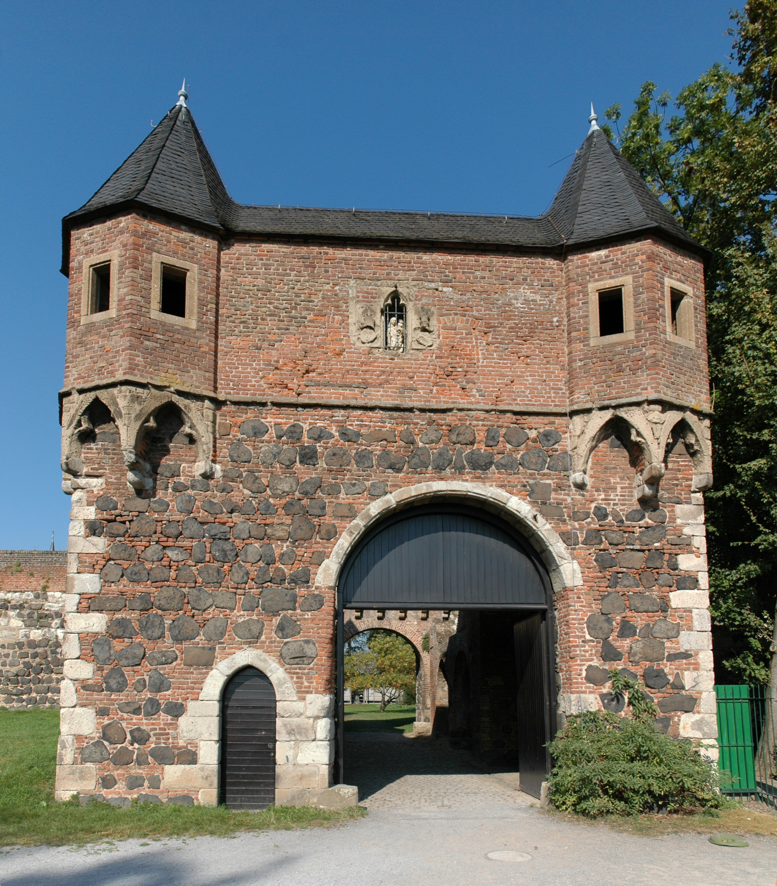 Südtor der Burg Friedstrom in Zons